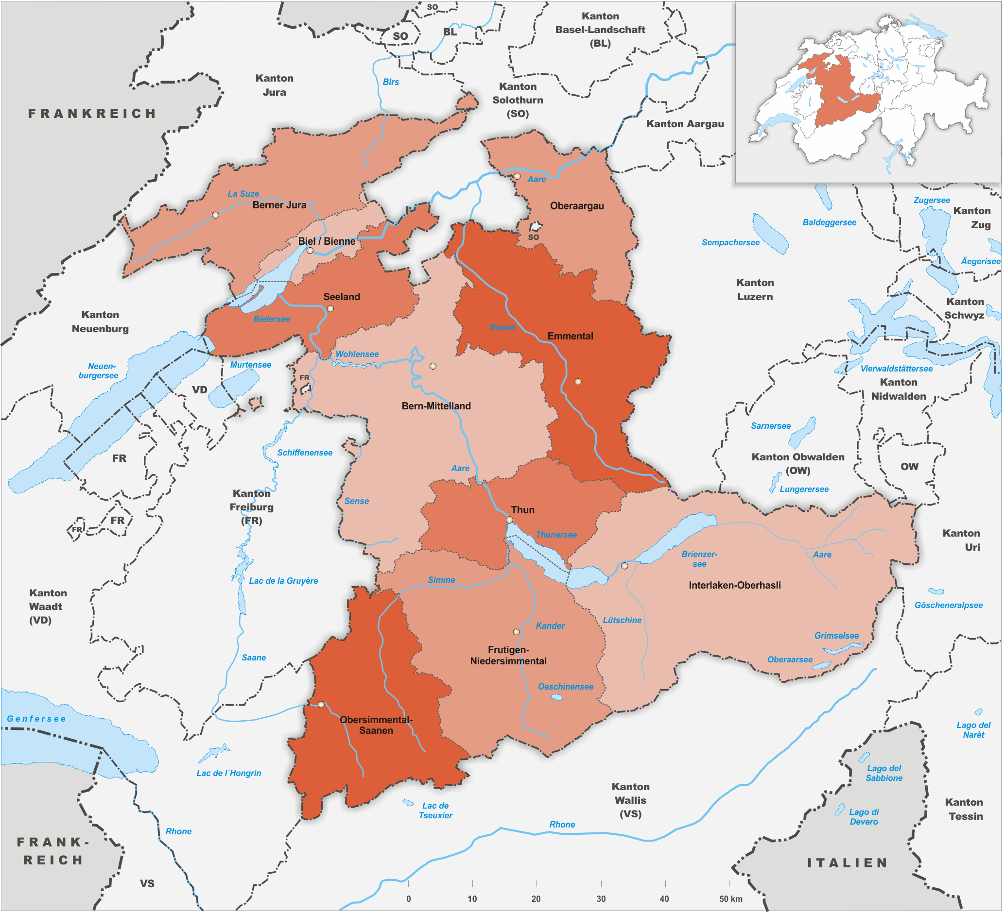 Verwaltungskreise des Kanton Bern